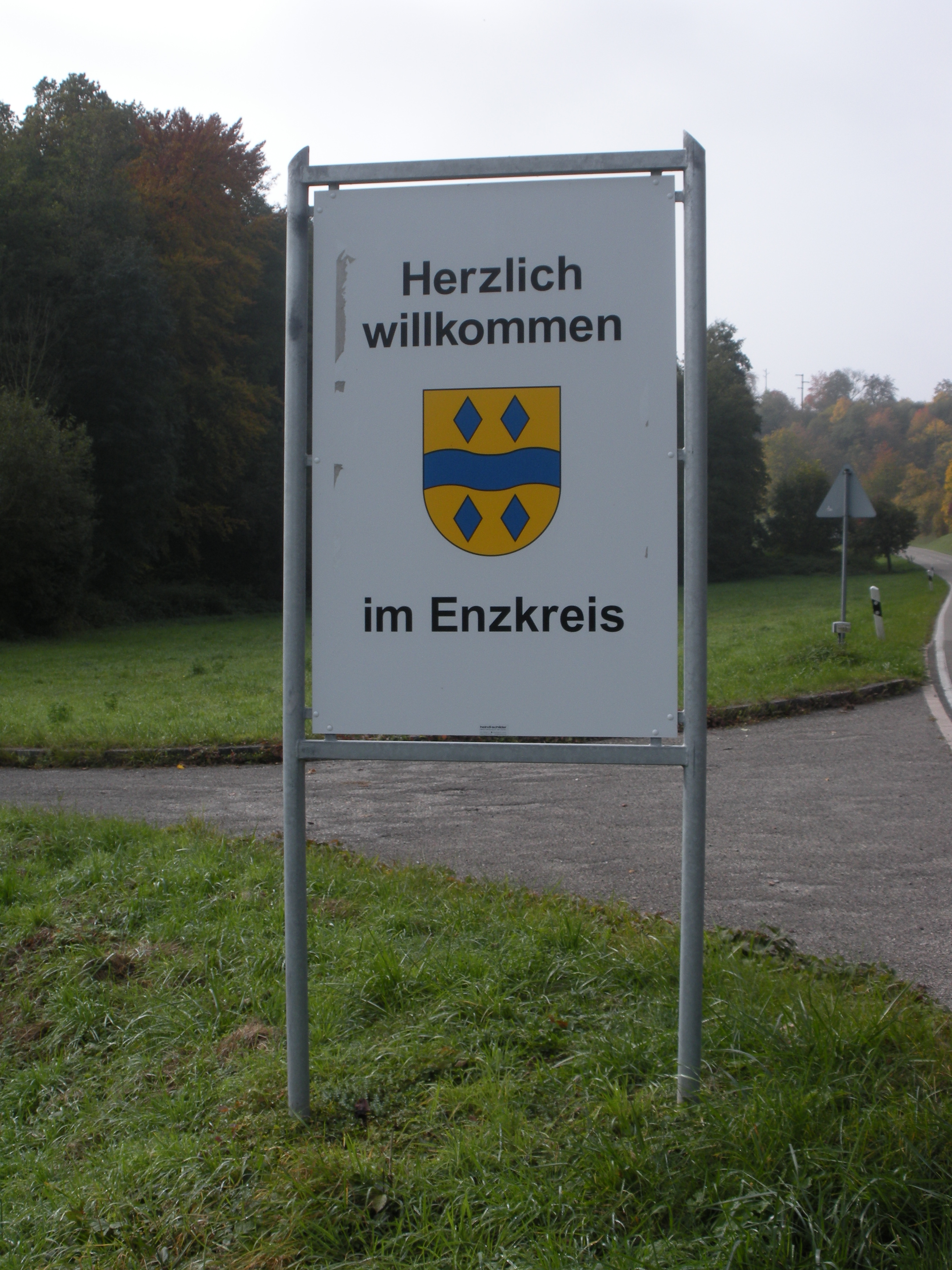 Enzkreis - Begrüungsschild an der Kreisgrenze bei Sternenfels